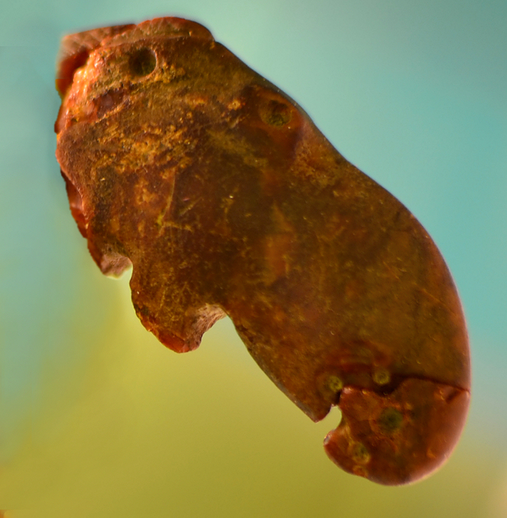 Kopf des Bernsteinelchs von Weitsche im Niedersächsischen Landesmuseum in Hannover, Kopf aus dem Körper herausretuschiert